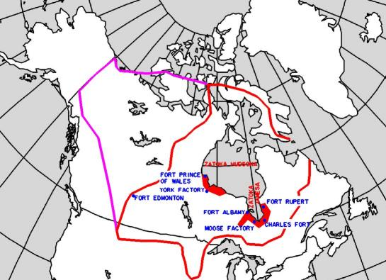 Zasięg terytorialny Kompanii Zatoki Hudsona czerwone obszary - zasięg wpływów kompani w pierwszych latach działalności czerwona linia - granice zasięgu kompanii do 1821 fioletowa linia - granice zasięgu kompanii po połączeniu się z Kompanią Północno-Zachodnią